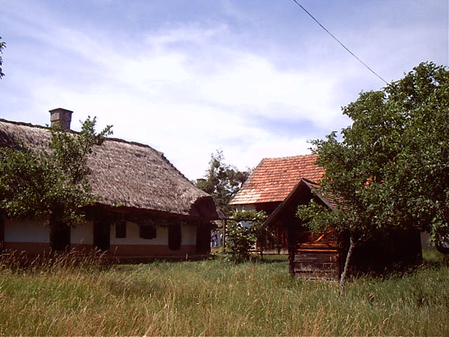 Pityerszeri zárt udvar